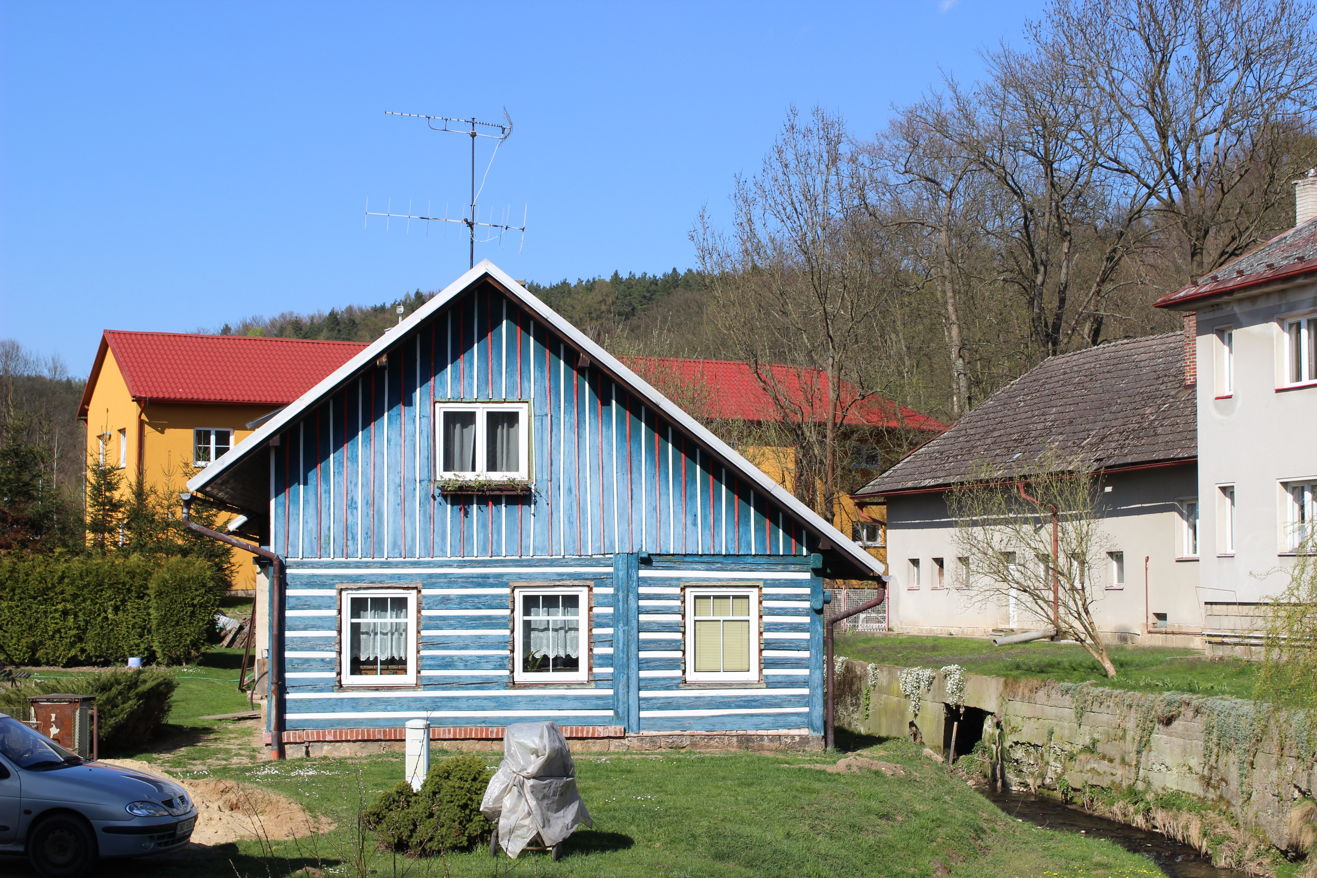 Dům číslo popisné 16 v Sekerkových Loučkách, části Mírové pod Kozákovem.